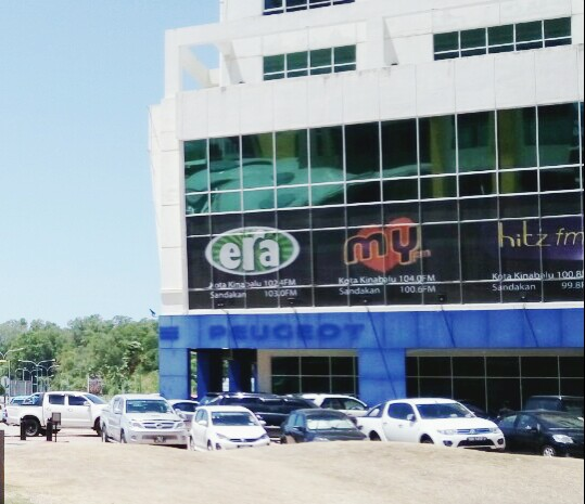 Peninsular based-radio stations advertisement in a building on Kota Kinabalu, Sabah, Malaysia.